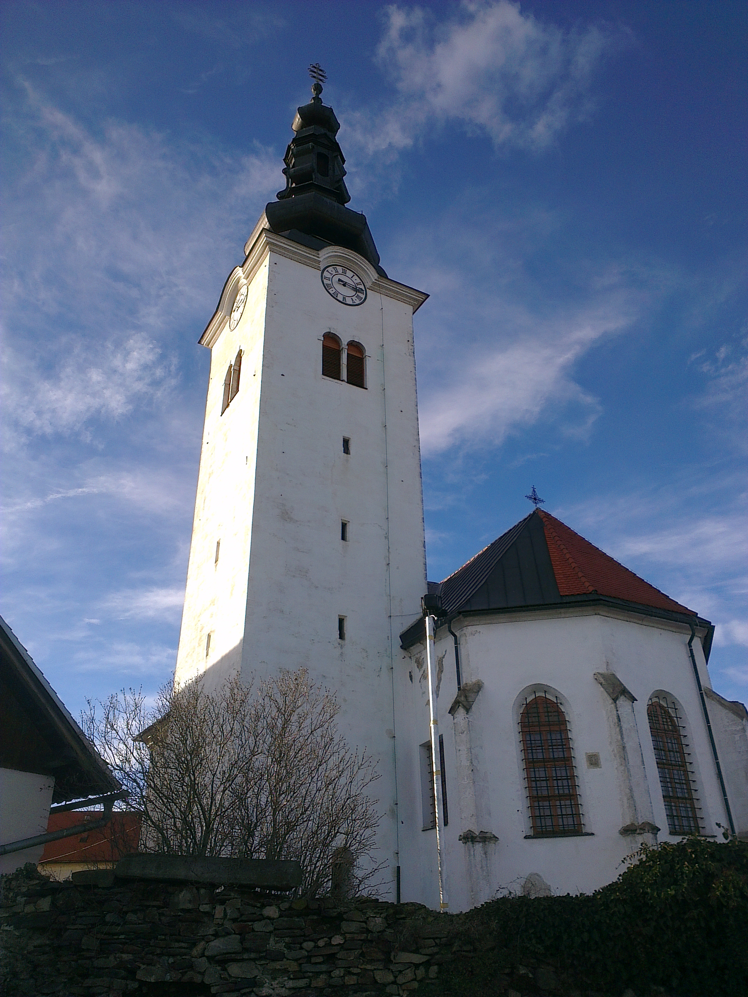 Cerkev Marijinega rojstva